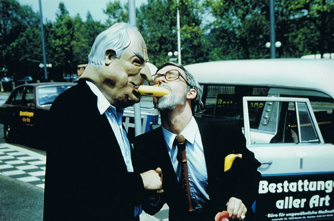 "Die Übergabe des Kaufpreises für die DDR in Bonn" im Rahmen der BRDigungs-Aktion "Das letzte Geläut" / Büro für ungewöhnliche Maßnahmen, Berlin